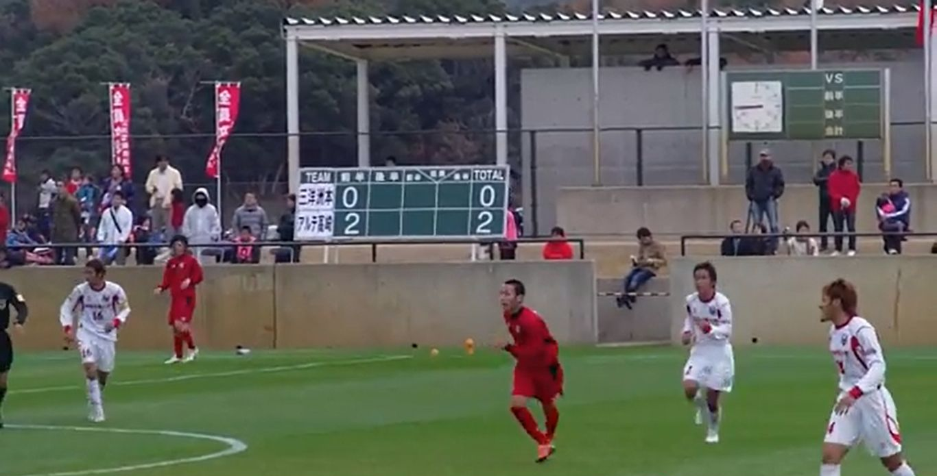 2010年のJFL/地域リーグ入替戦(第1戦)。於 五色台運動公園メイングラウンド[洲本市](兵庫県洲本市五色町鳥飼浦2613) 三洋電機洲本(赤) v. アルテ高崎(白)